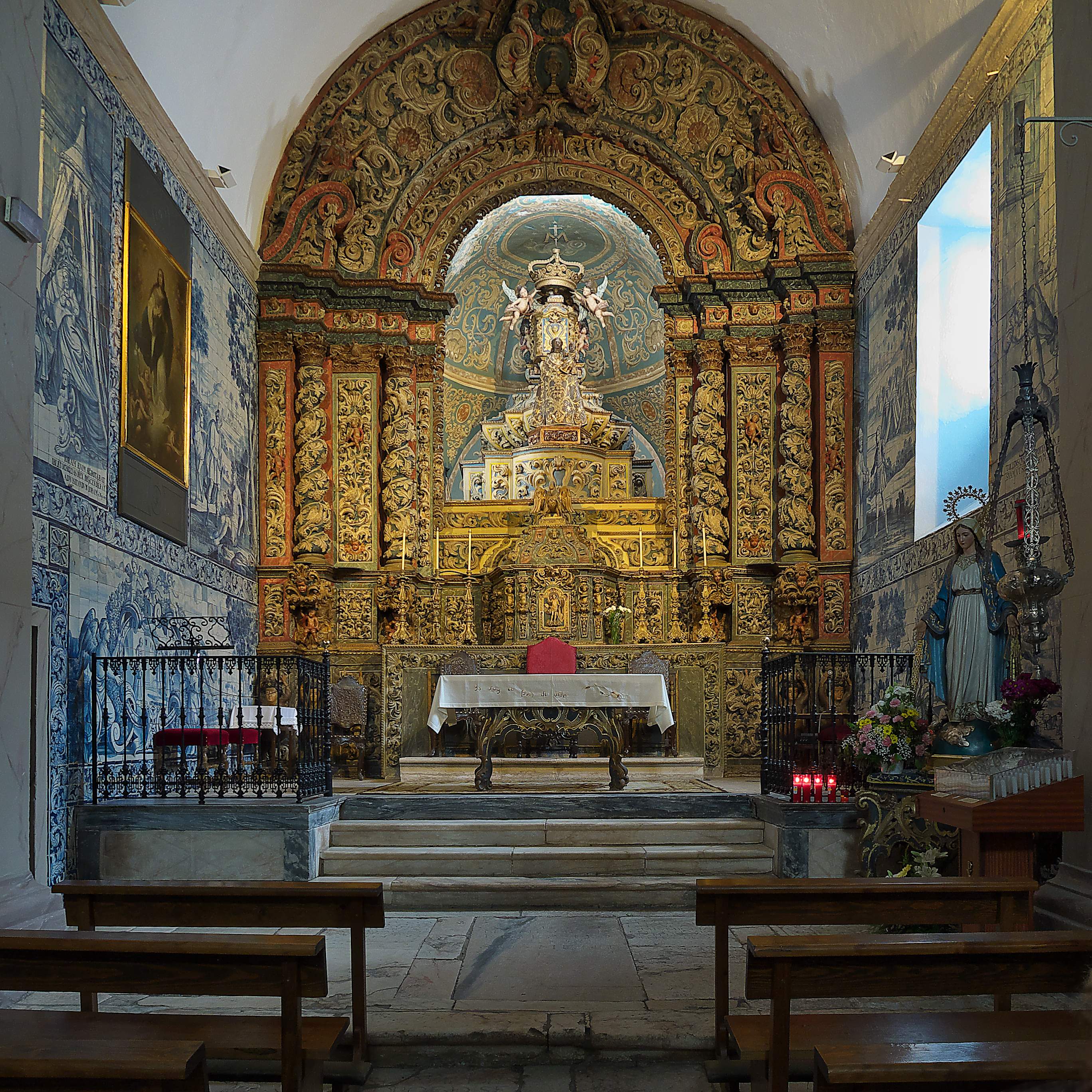 Santa Casa de Misericordia (1501). Retablo mayor de la Capilla del Espíritu Santo, principios del siglo XVIII.